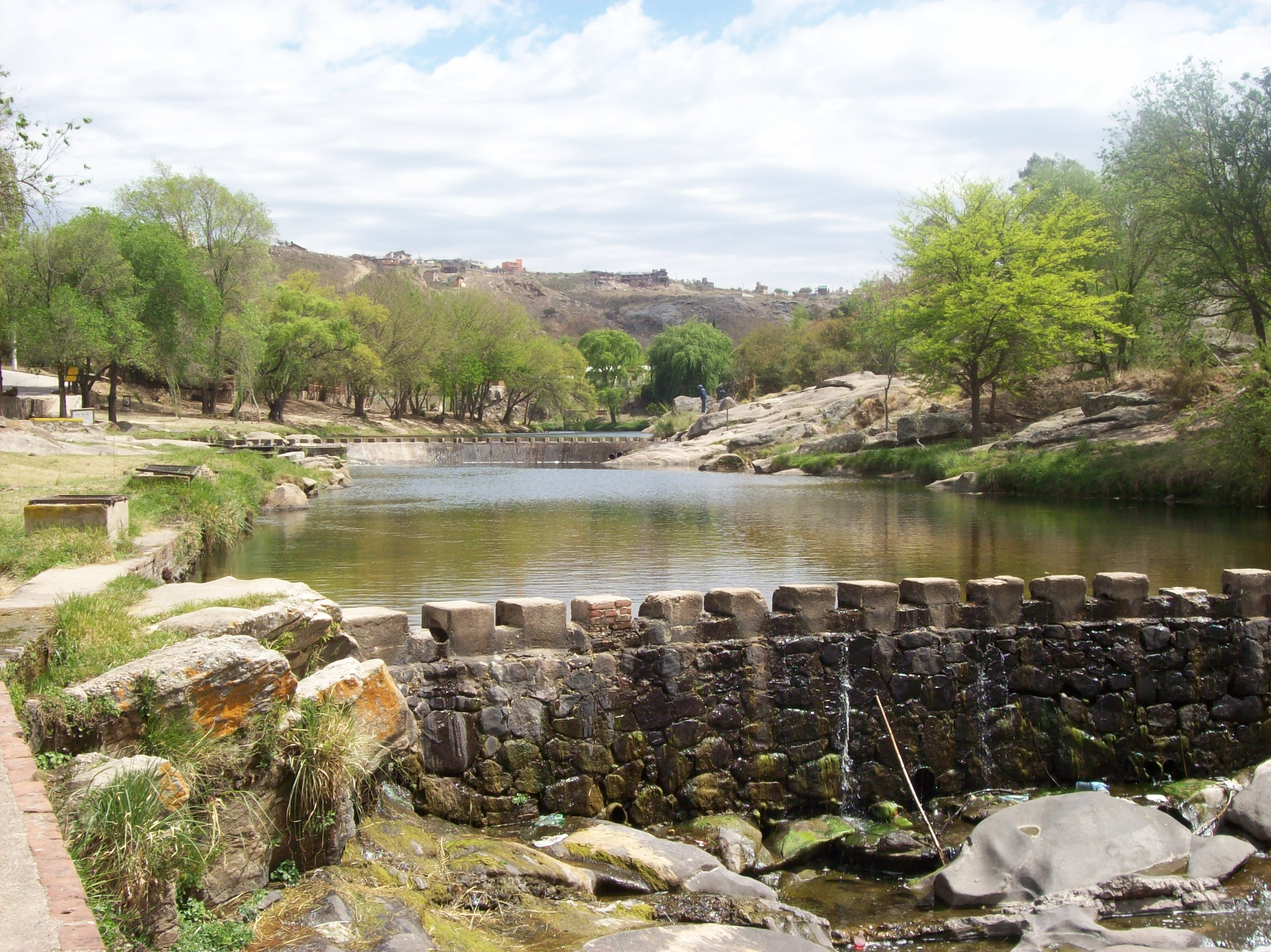 Balneario El Diquecito sobre el arroyo El Chorrillo en Villa Carlos Paz, provincia de Córdoba, Argentina.